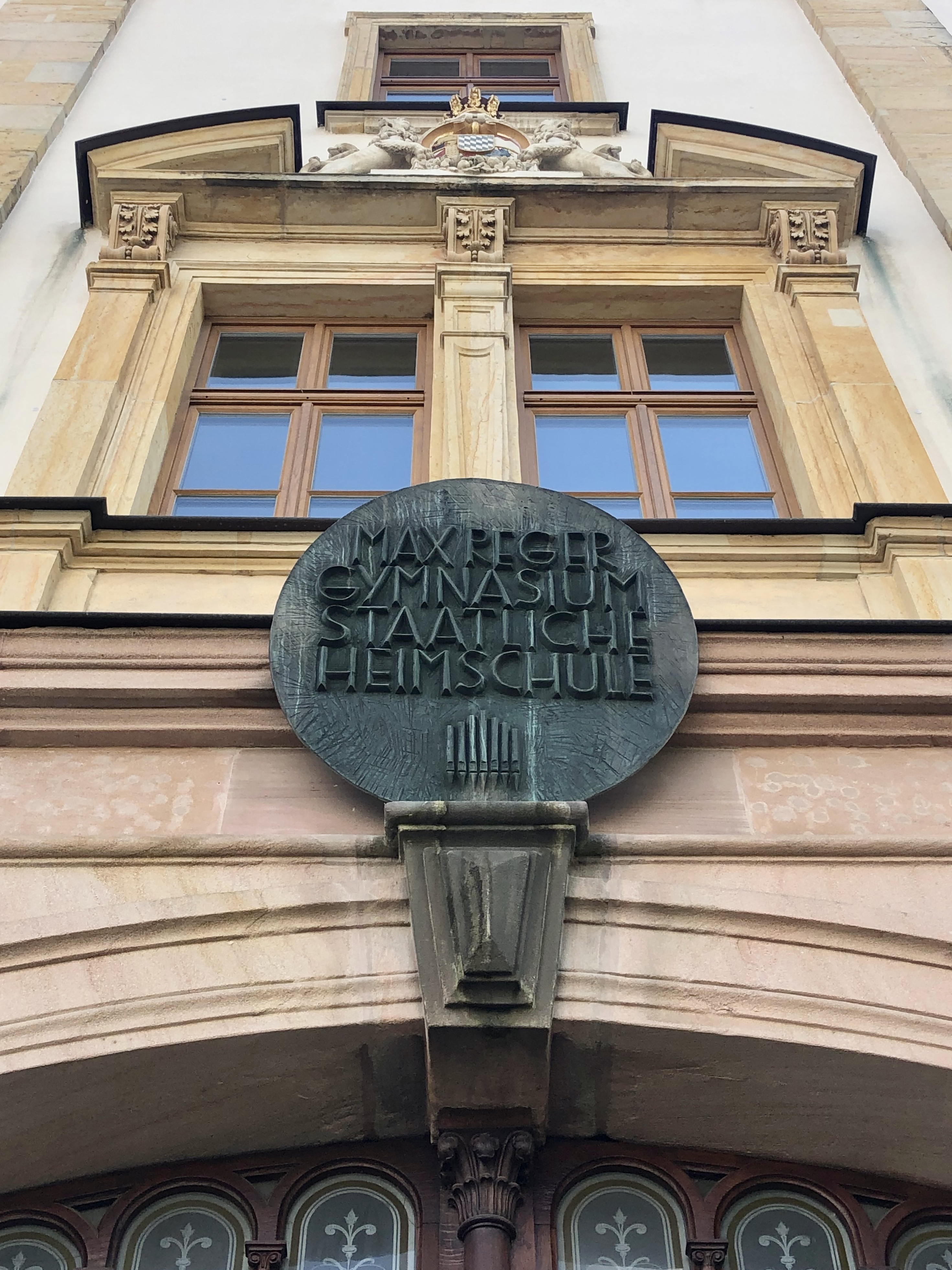 Das Hauptportal (1880) des Musischen Gymnasiums